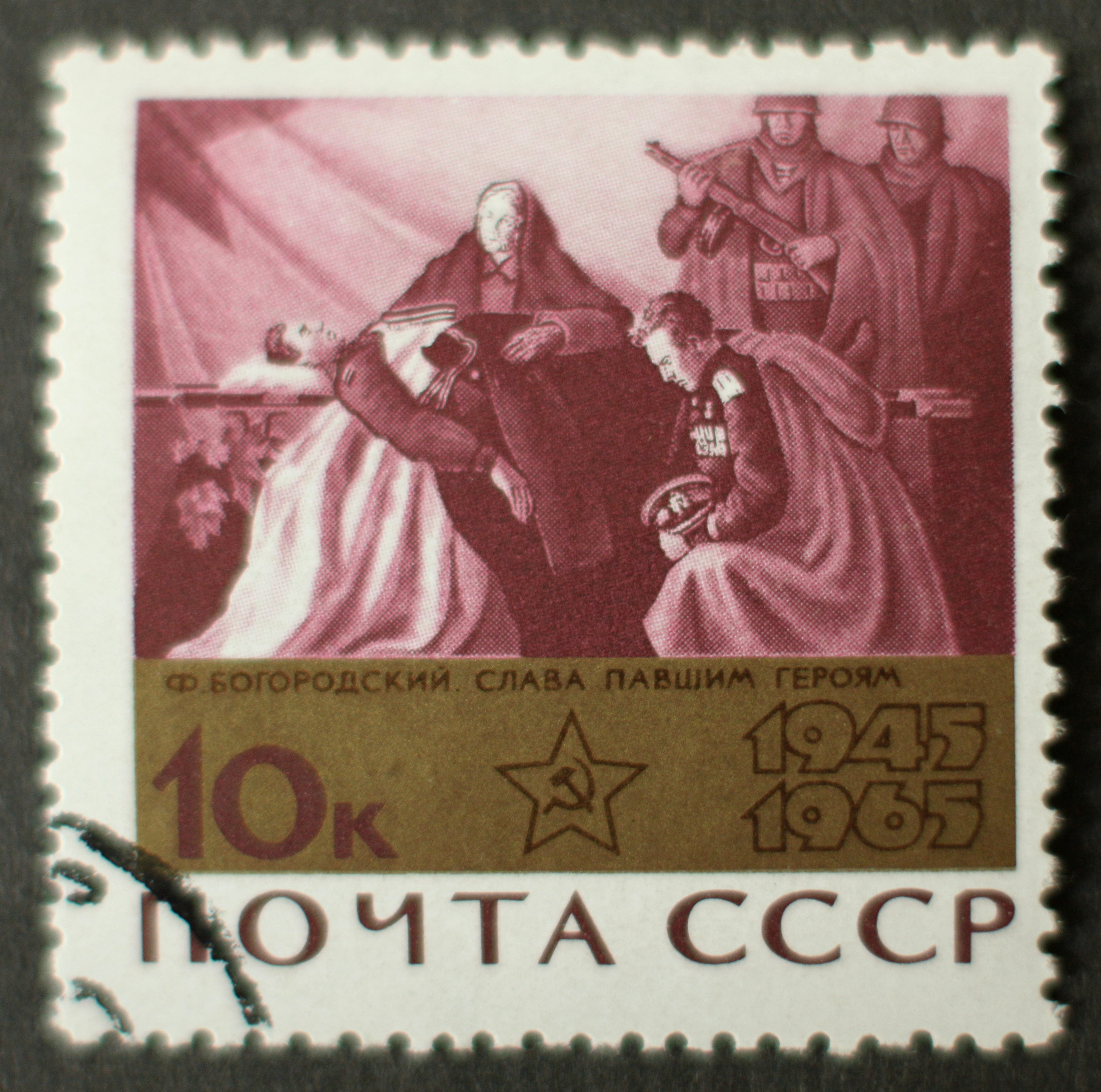 Почтовая марка СССР 1965 года из серии «20-летие победы советского народа в Великой Отечественной войне 1941—1945 гг.» под названием «Слава павшим героям» (1945, по картине Ф. Богородского). Оформление Е. Анискина. Номер — 3203 (ЦФА). Тираж — 4 млн экз.